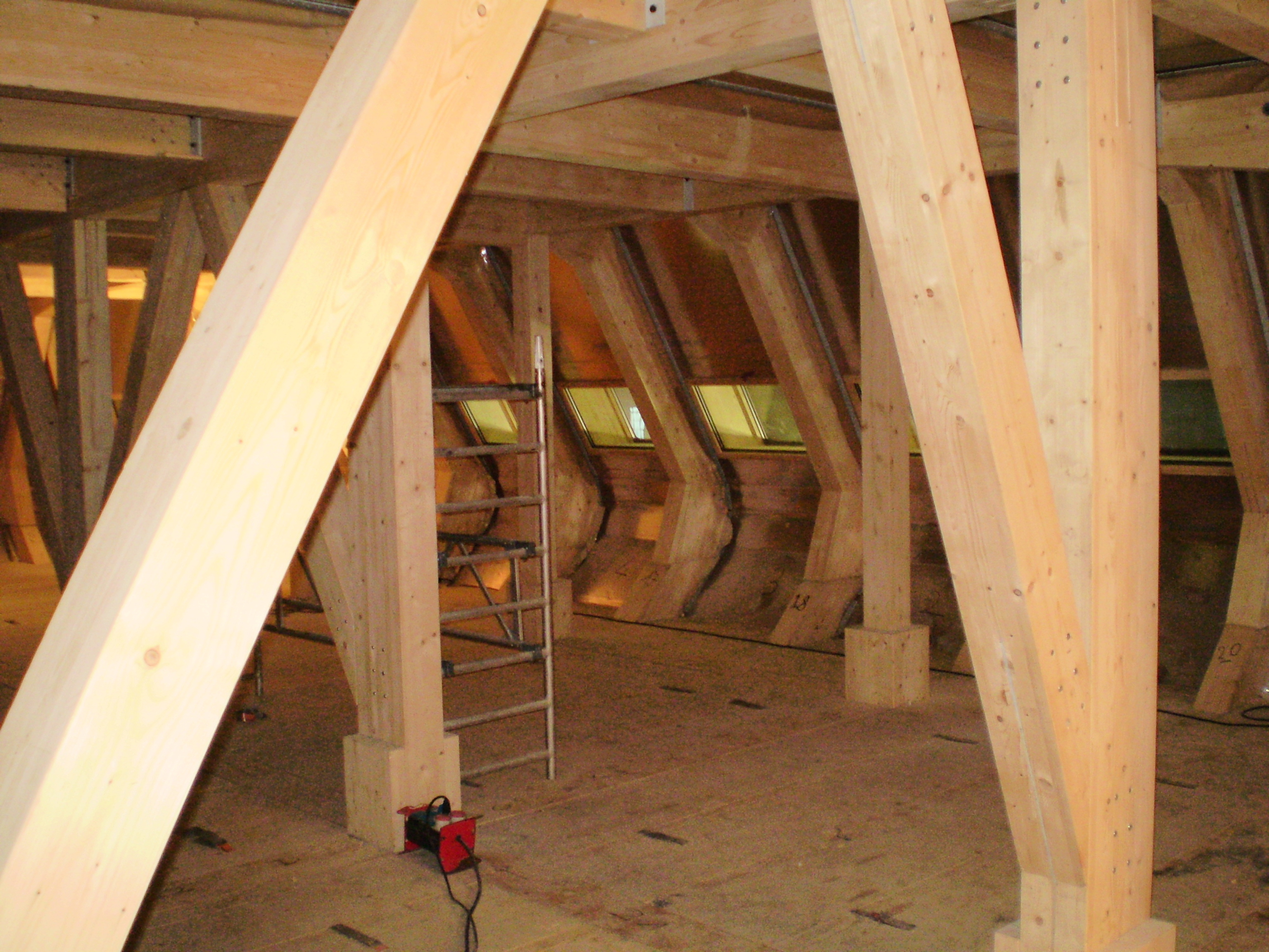 Base antarctique Princesse Elisabeth, prémontée et présentée au public le lendemain de son inauguration - ancienne gare maritime de Tour et Taxis, à Bruxelles - structure de la charpente interne